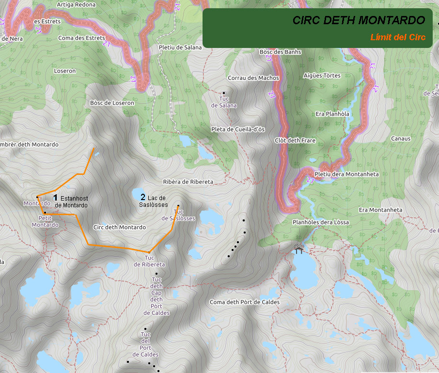 Límits dels Circ deth Montardo